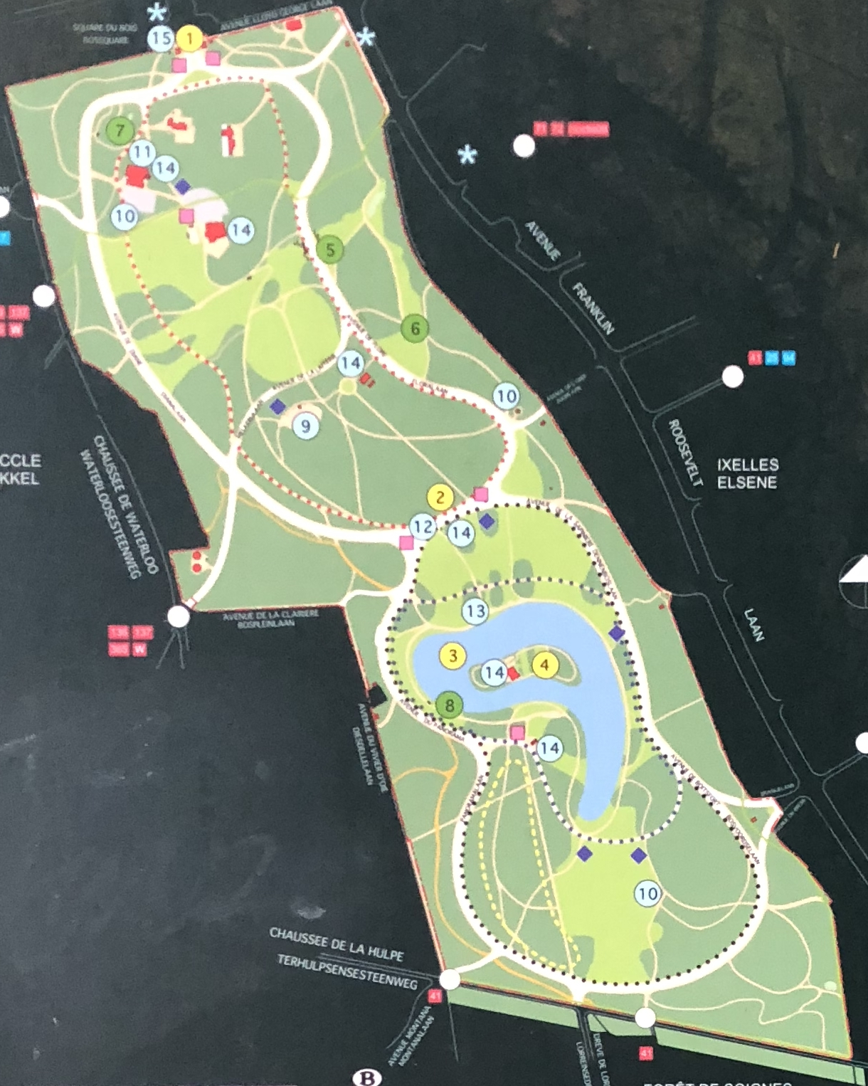 Bord met plattegrond en toelichting in het Ter Kamerenbos (Brussel).